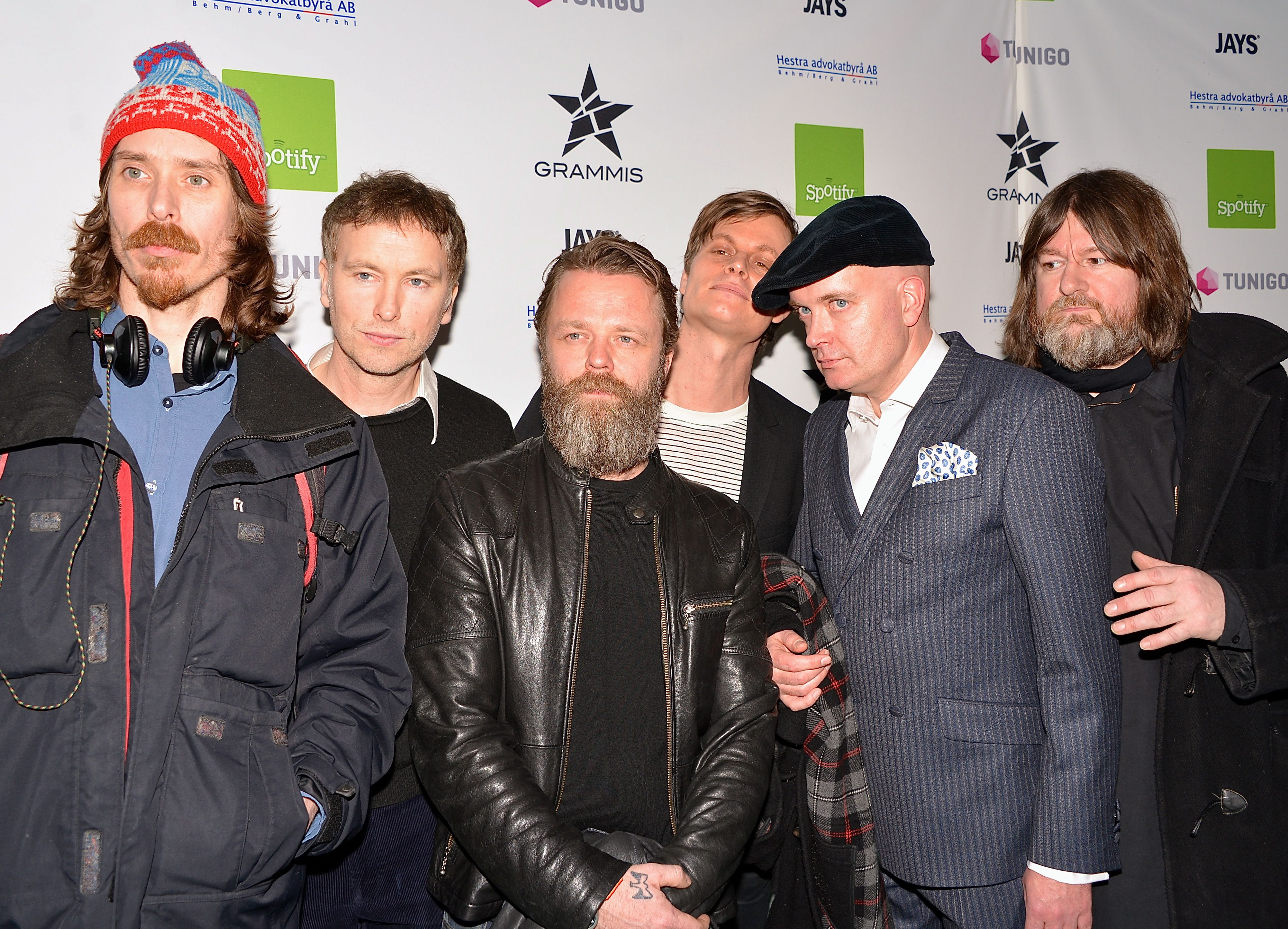 The Soundtrack of Our Lives på Grammisgalan på Cirkus i Stockholm den 20 februari 2013. Från vänster: Mattias Bärjed, Kalle Gustafsson-Jerneholm, Ian Person, Martin Hederos, Fredrik Sandsten och Ebbot Lundberg.